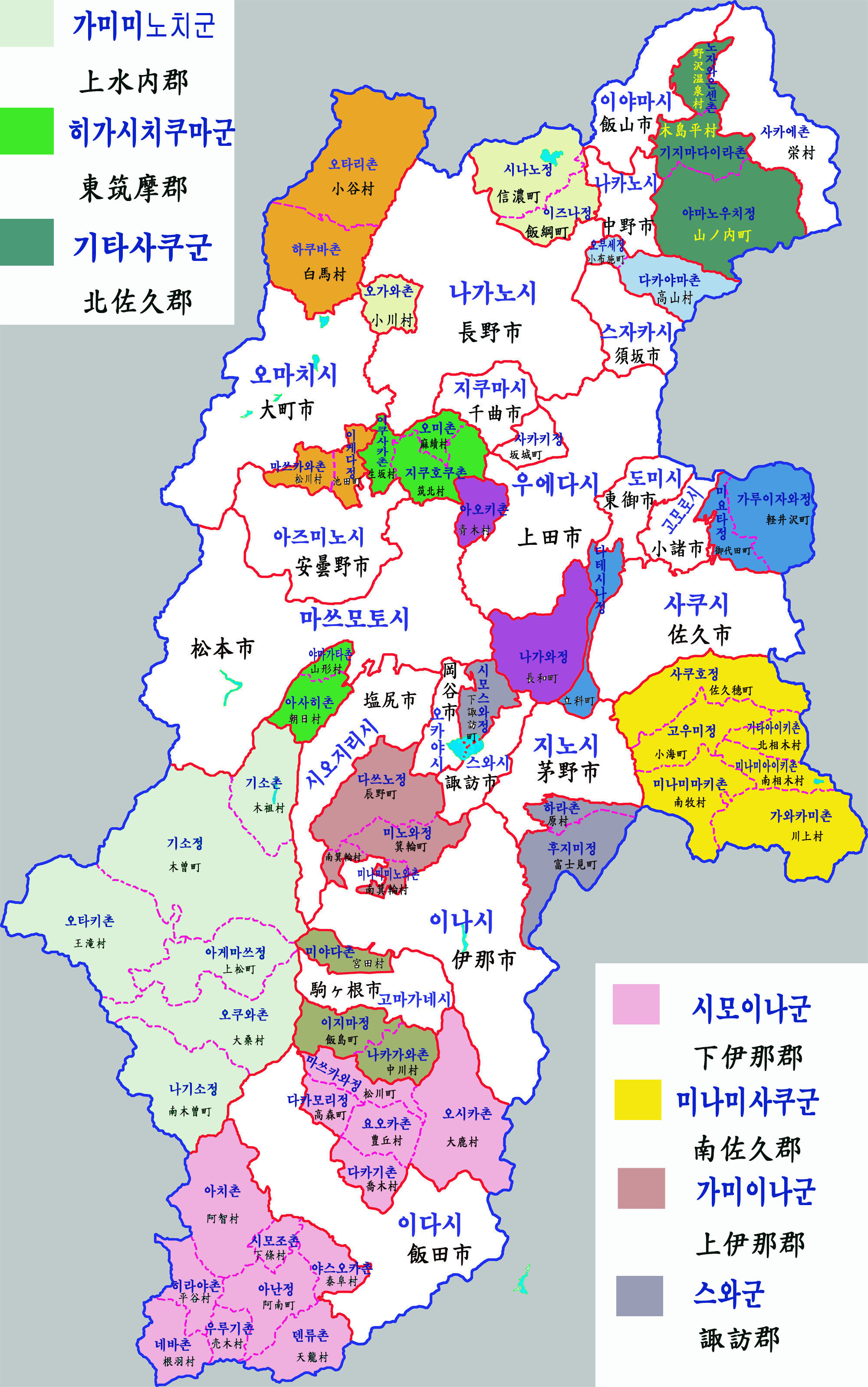 나가노현 행정구역